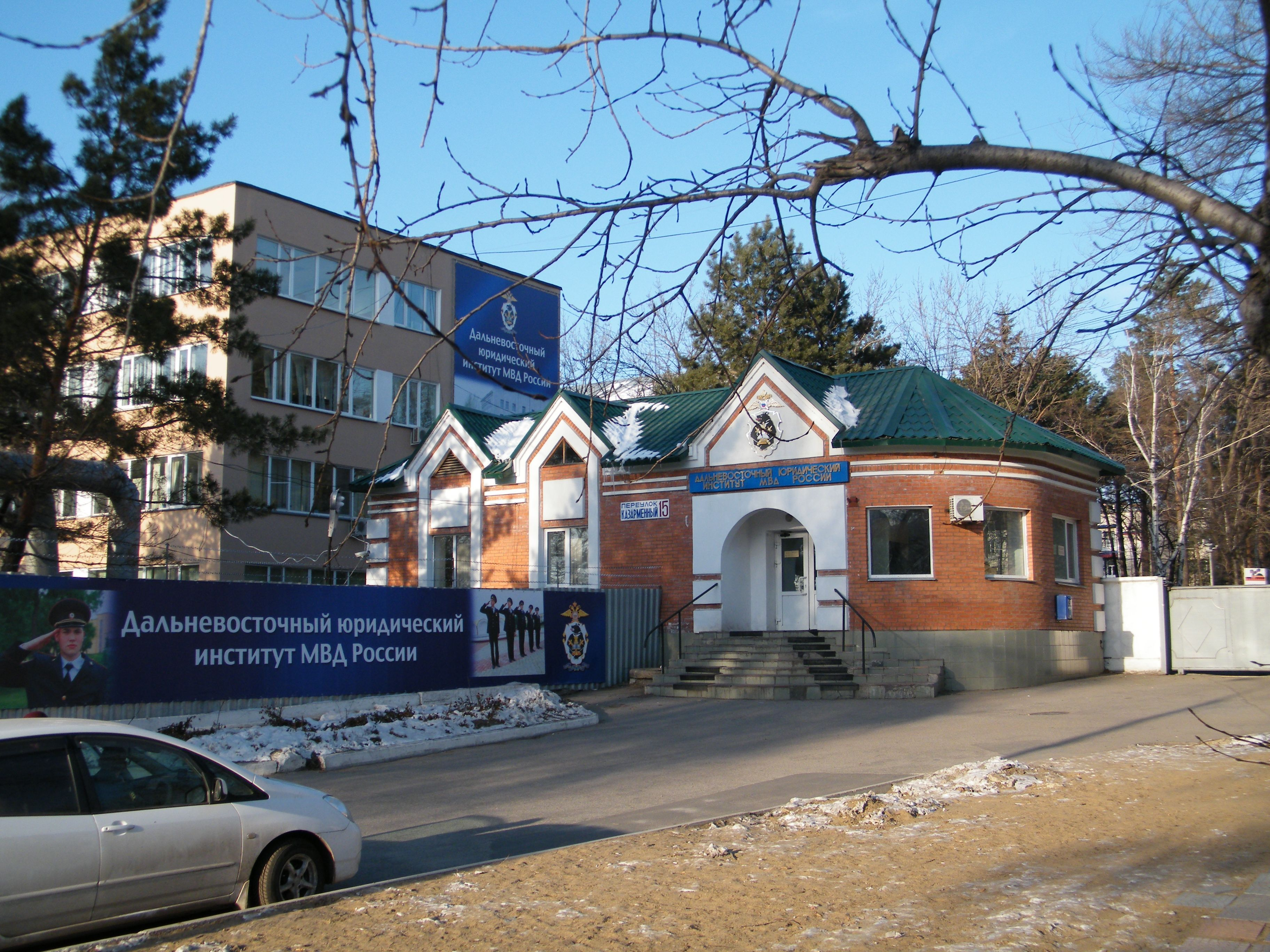 Дальневосточный юридический институт МВД РФ, Хабаровск